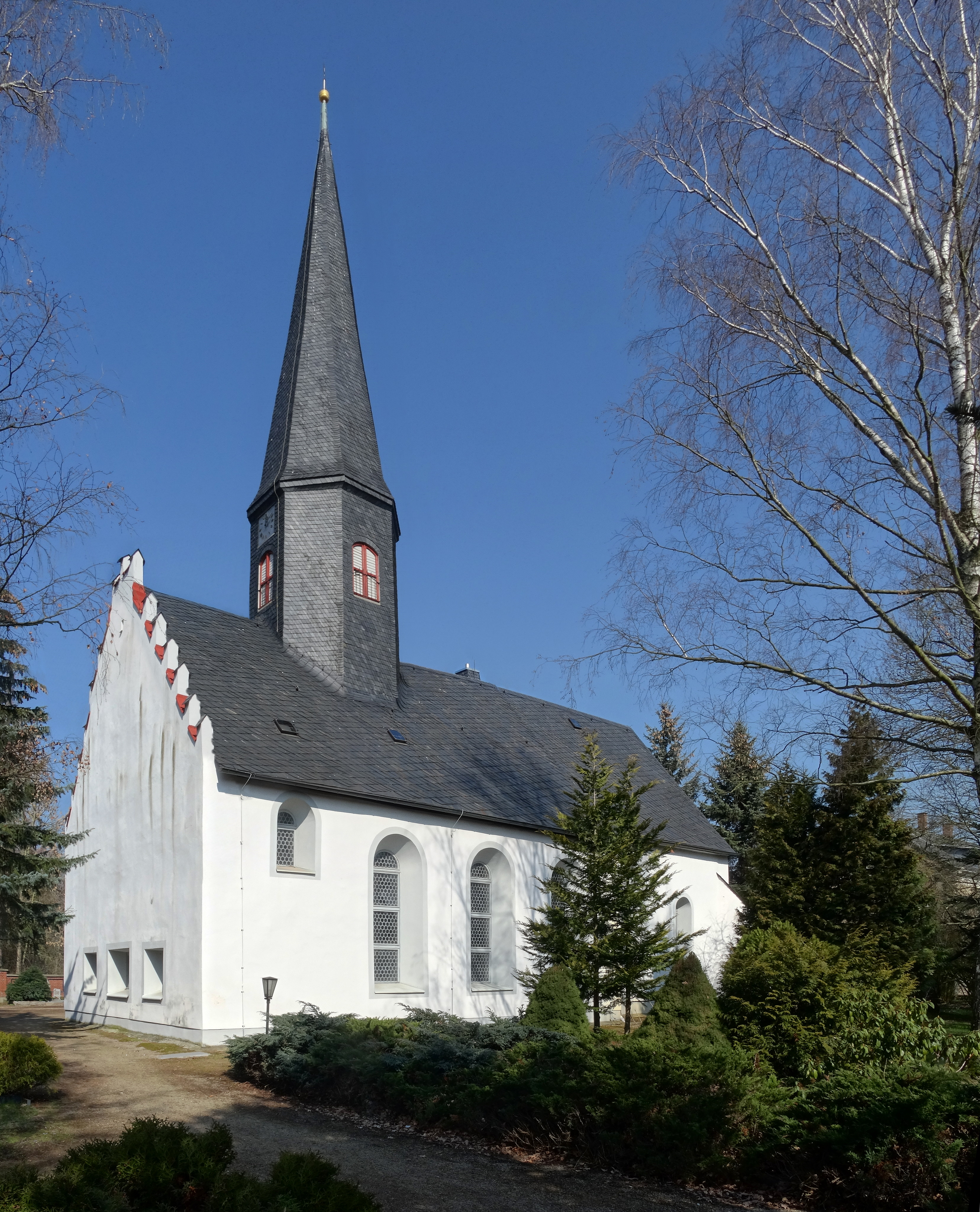 Langenhessener Kirche St. Johannis